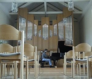 Die Orgel im großen Orgelsaal von Orgelbau Goll (34 Register III/P, 1995)